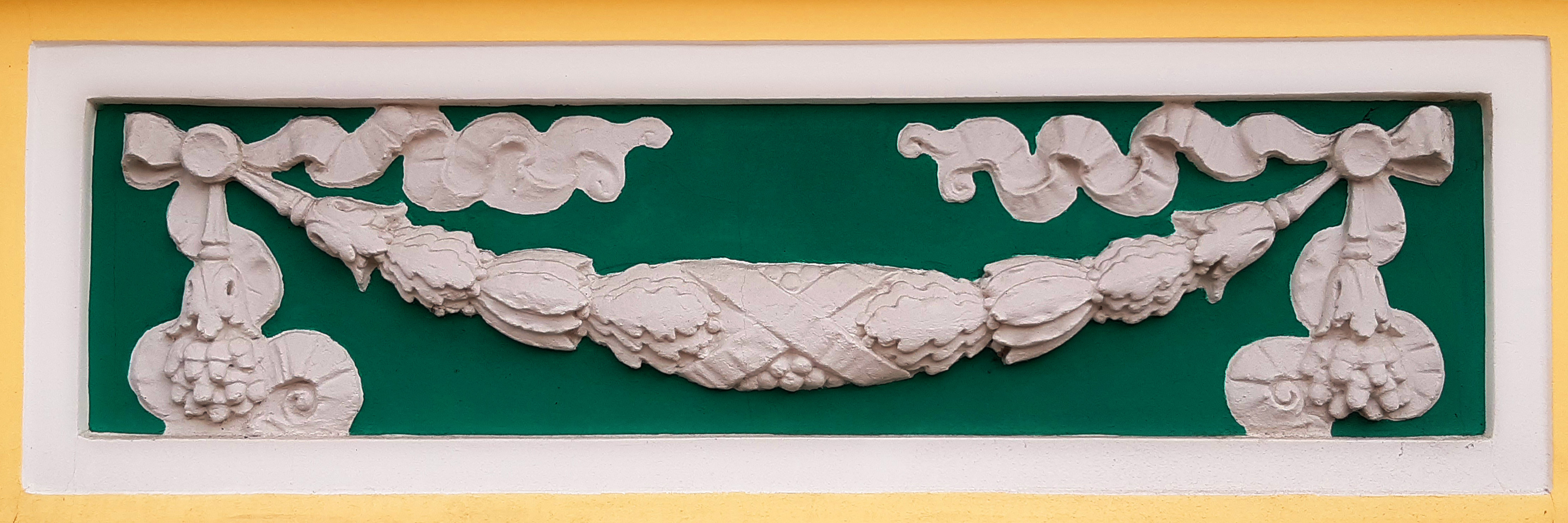 Будинок контори торгового дому «Т. М. Апштейн і сини», Київ, Спаська вул., 12